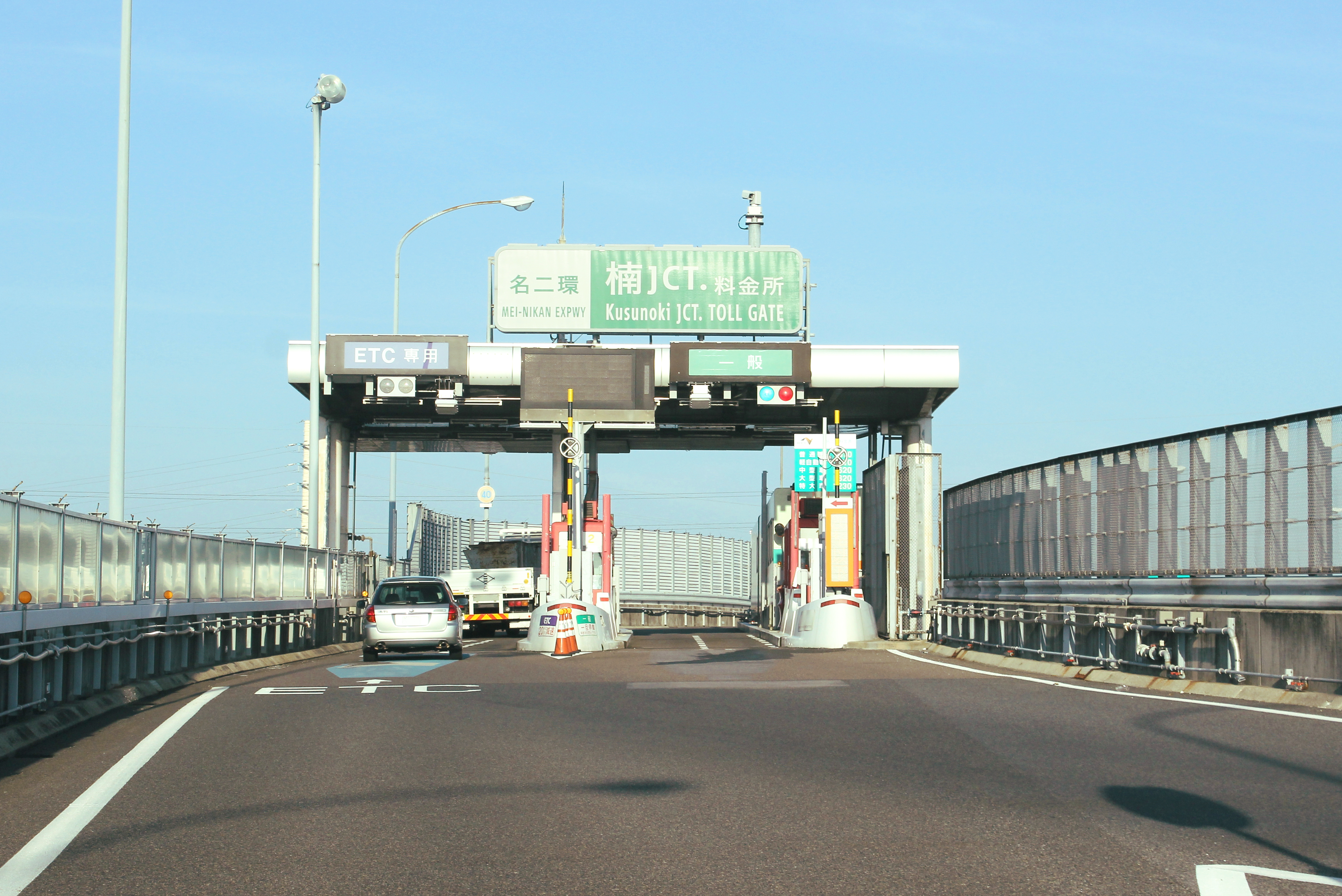 名二環 楠JCT料金所（内回り側）